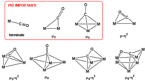 Traduzione del file CObondingmodes2.GIF in italiano